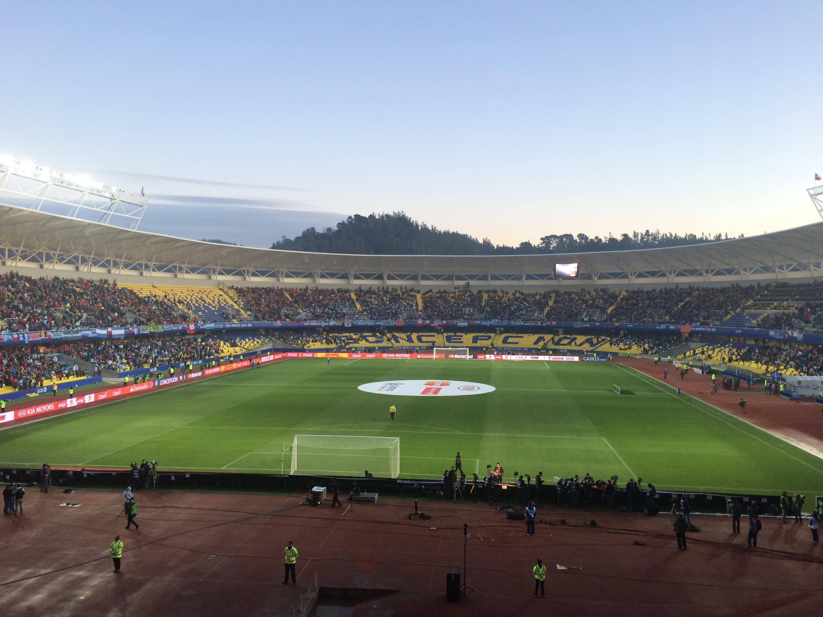 El Estadio Municipal de Concepción durante las semifinales de la Copa América Chile 2015 entre las selecciones de Argentina y Paraguay (6-1), el 30 de junio de 2015.